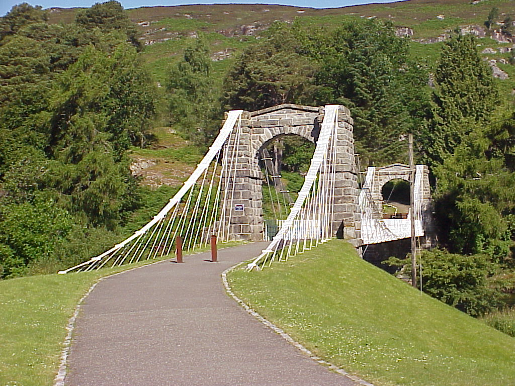 Bridge of Oich - Schottische Highlands - aufgenommen Sommer 2005